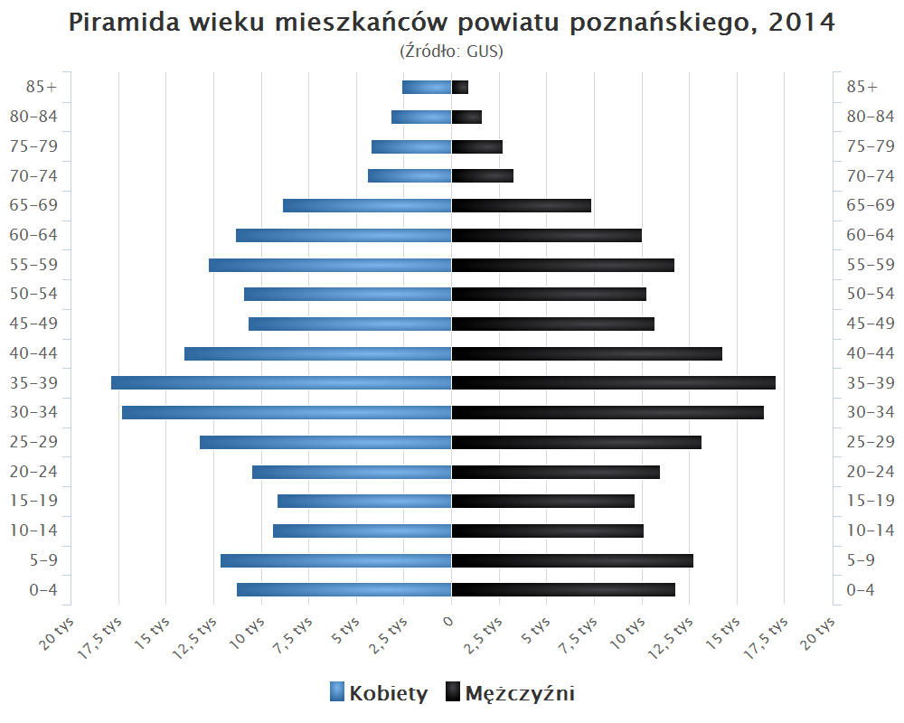 Piramida wieku mieszkańców powiatu poznańskiego, 2014